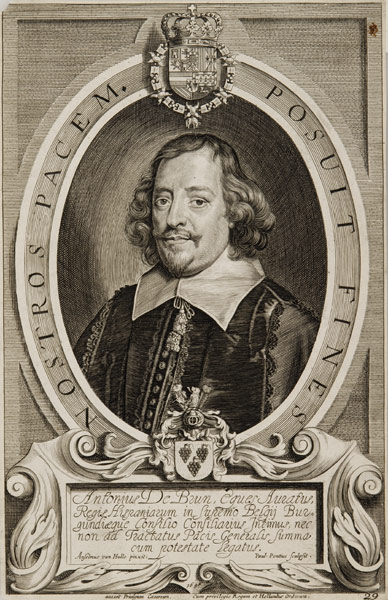 Porträt des Antoine Brun, spanischer Gesandter für Burgund in Münster; Münster, LWL-Landesmuseum für Kunst und Kulturgeschichte, Inventarnummer C-18215 LM